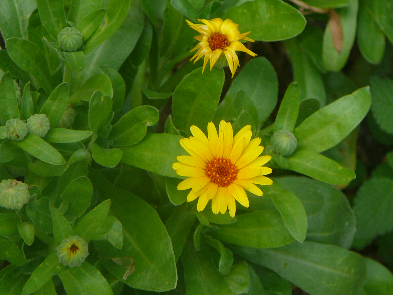 Calendula officinalis